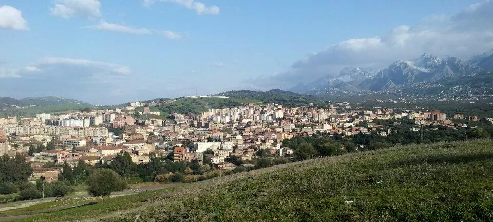 Photo de Boghni